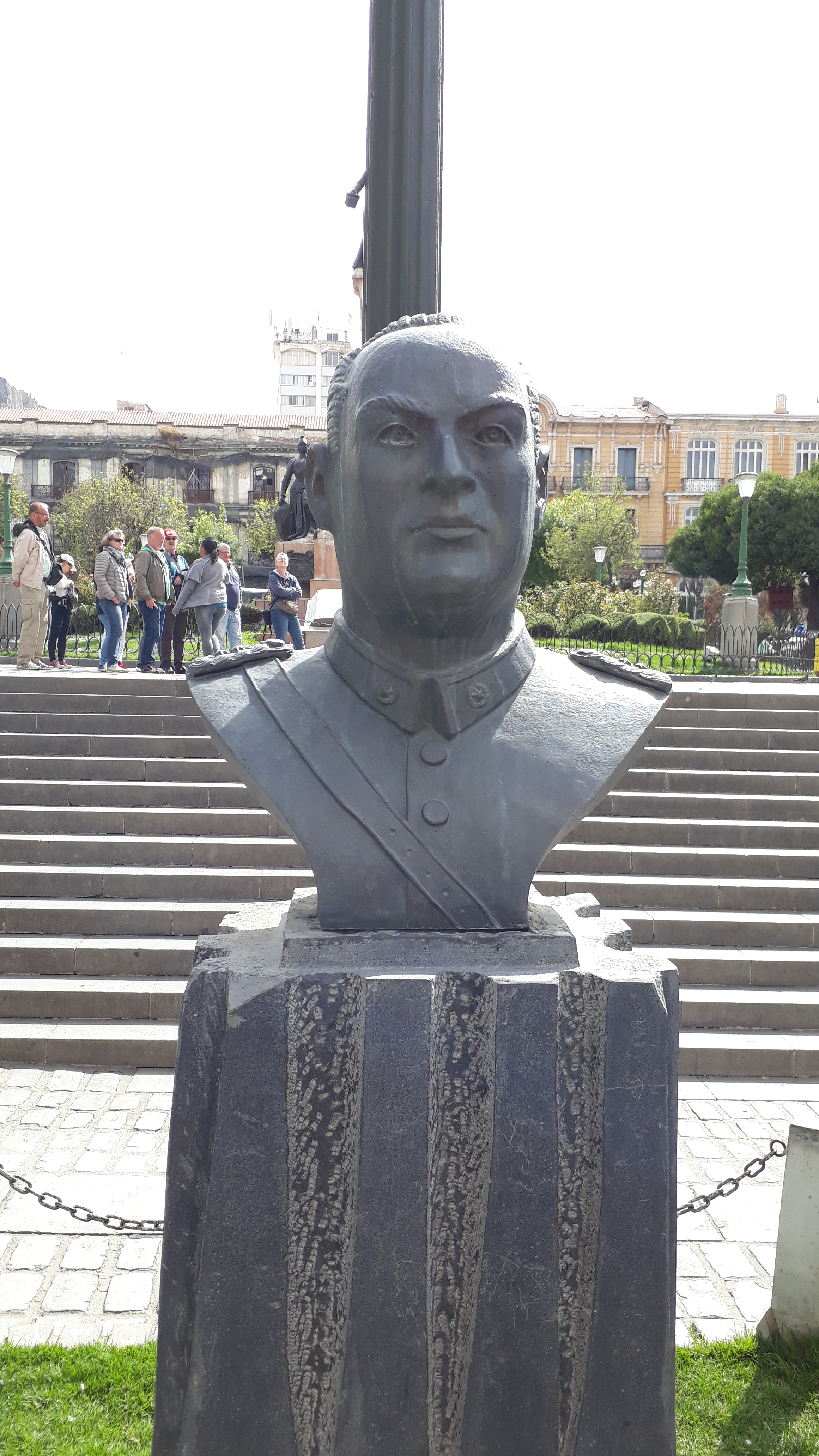 Busto de Gualberto Villarroel This medium shows the protected monument with the number L/00-230 in Bolivia.